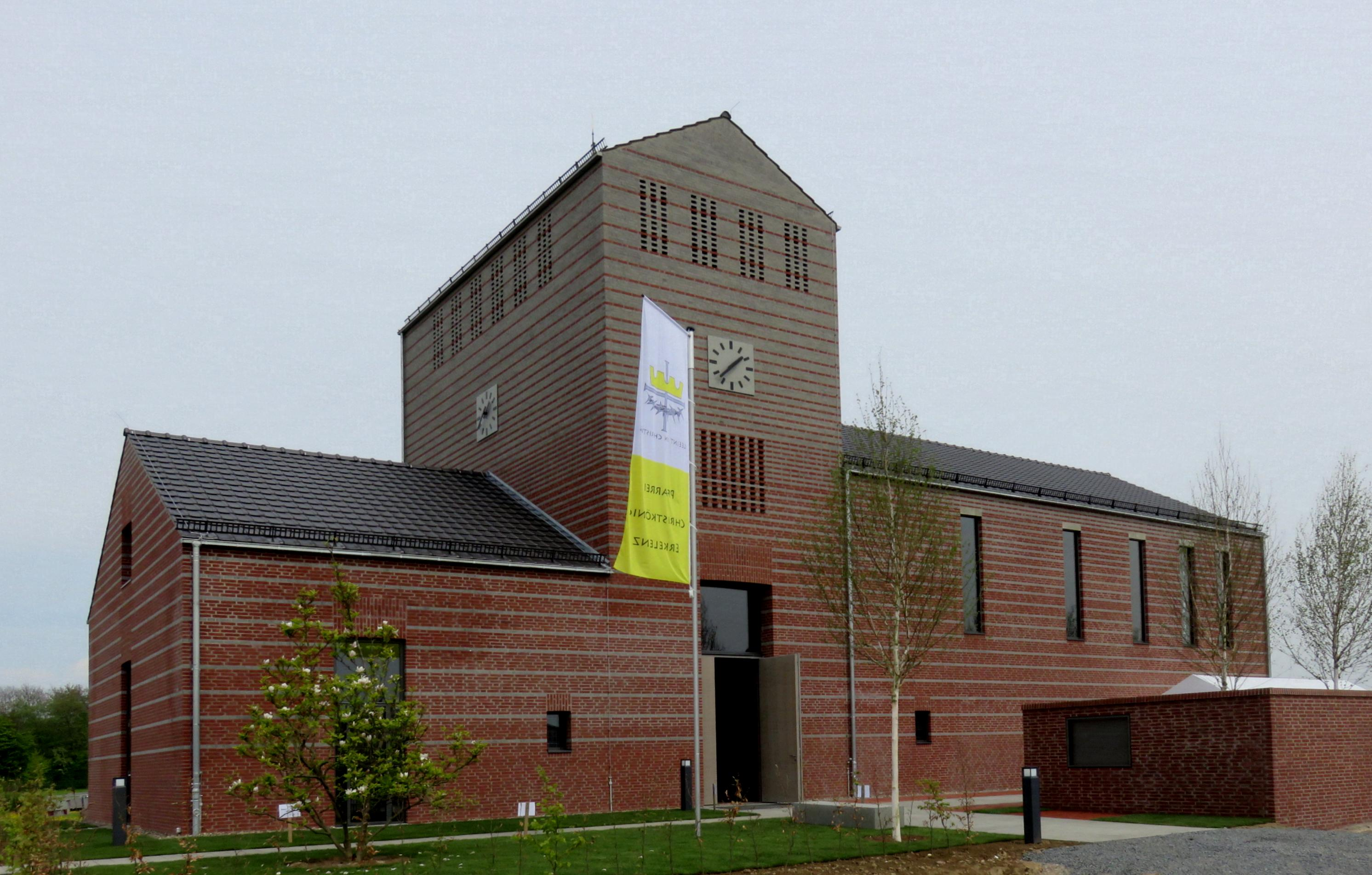 Bild aus der Martinuskapelle in Borschemich (neu)